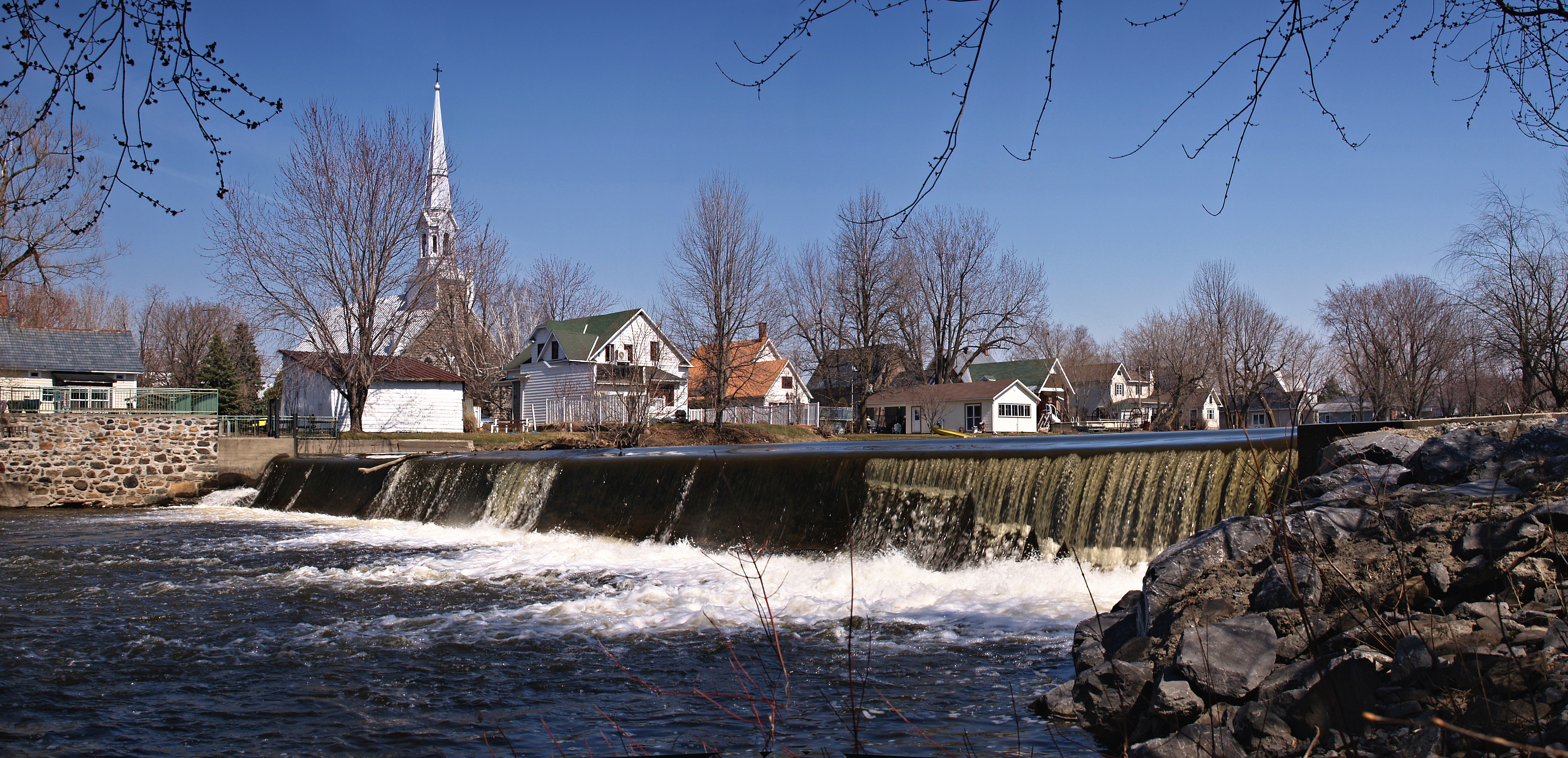 Notre-Dame-de-Stanbridge (Quebec) - Barrage sur la rivière aux Brochets